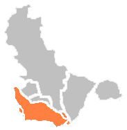 福州市区中仓山区（橙色）的位置